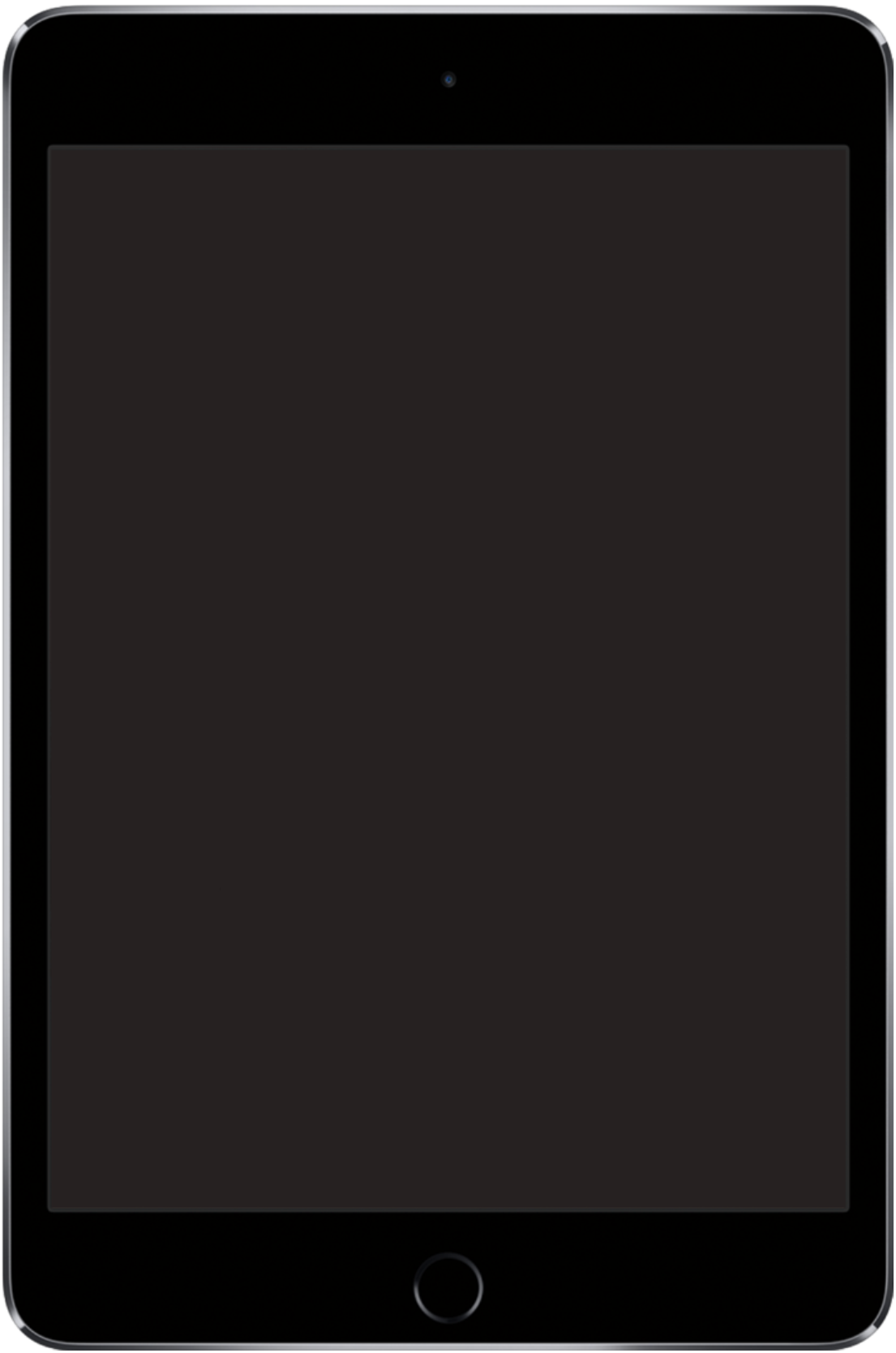 The iPad Mini 4